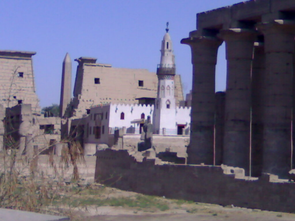 معبد الأقصر، وتظهر في الصورة المسلة ومسجد أبي الحجاج الأقصري المقام على الجدار الشمالي الشرقي للمعبد، وتظهر إحدى مئذنتي المسجد.